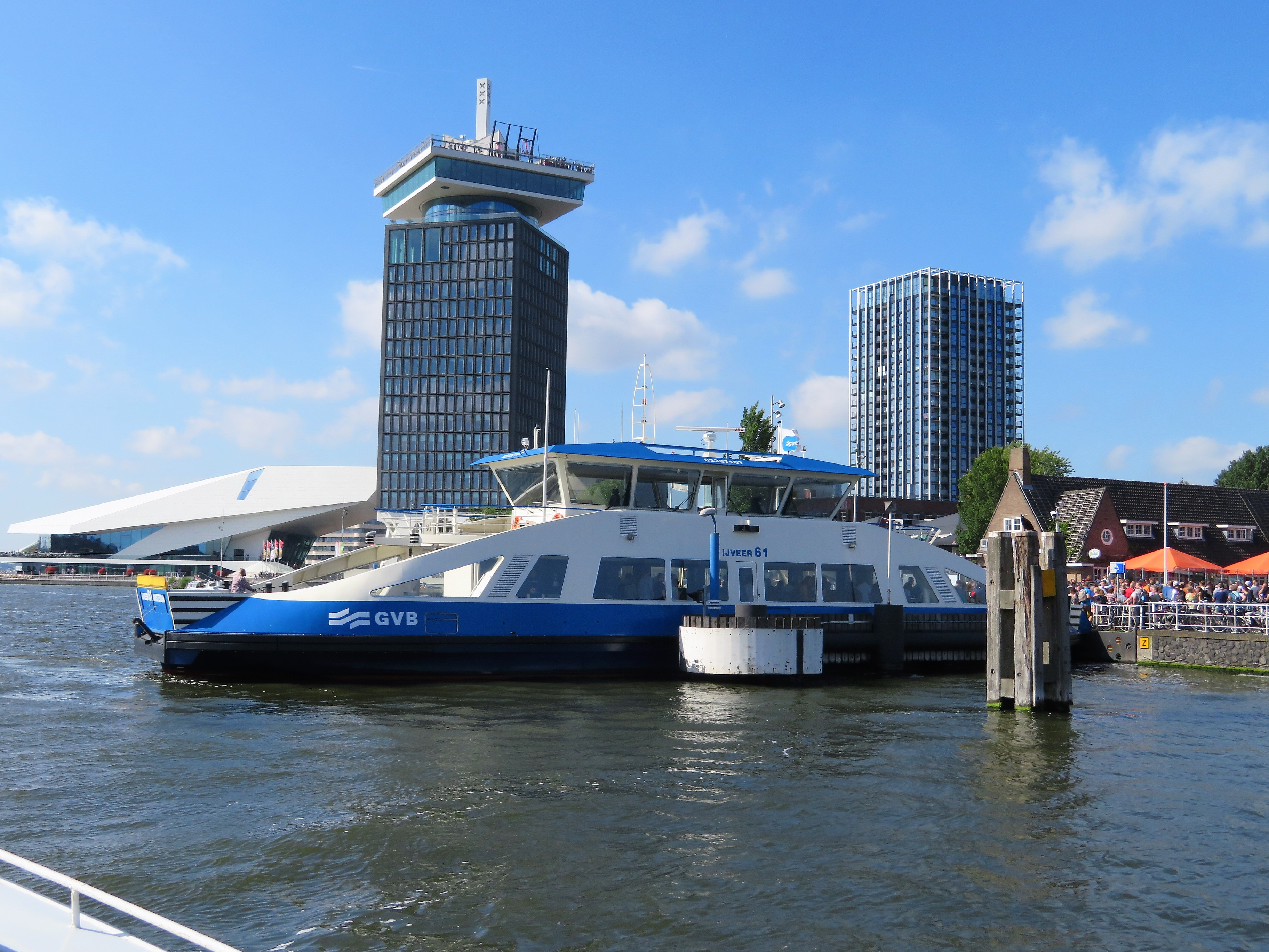 IJveer 61 op Het IJ in Amsterdam voor de ADAM toren en links het Eye Filmmuseum